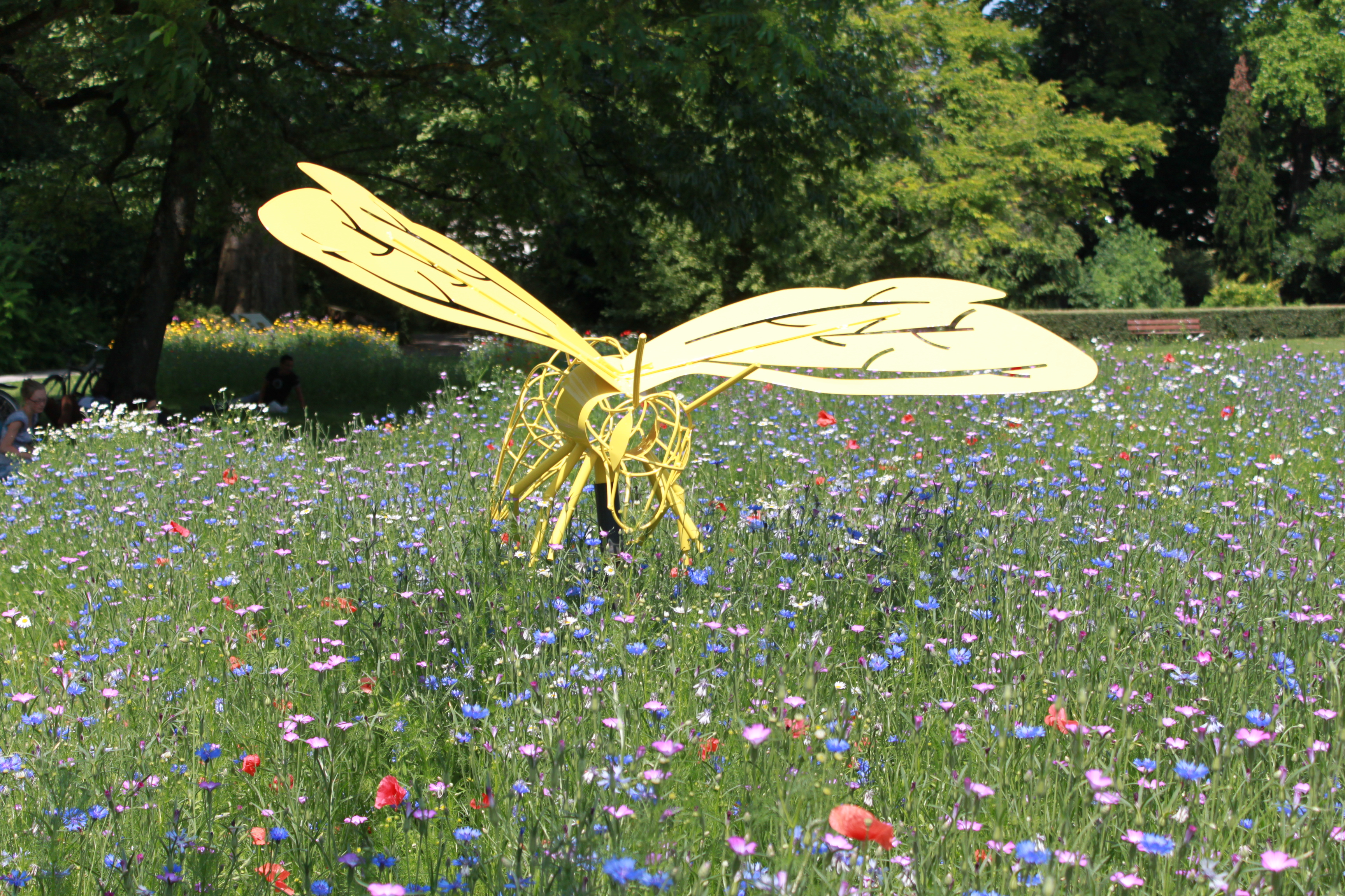 Jardin de l'Arquebuse, Dijon, Côte d'Or, Bougogne, France